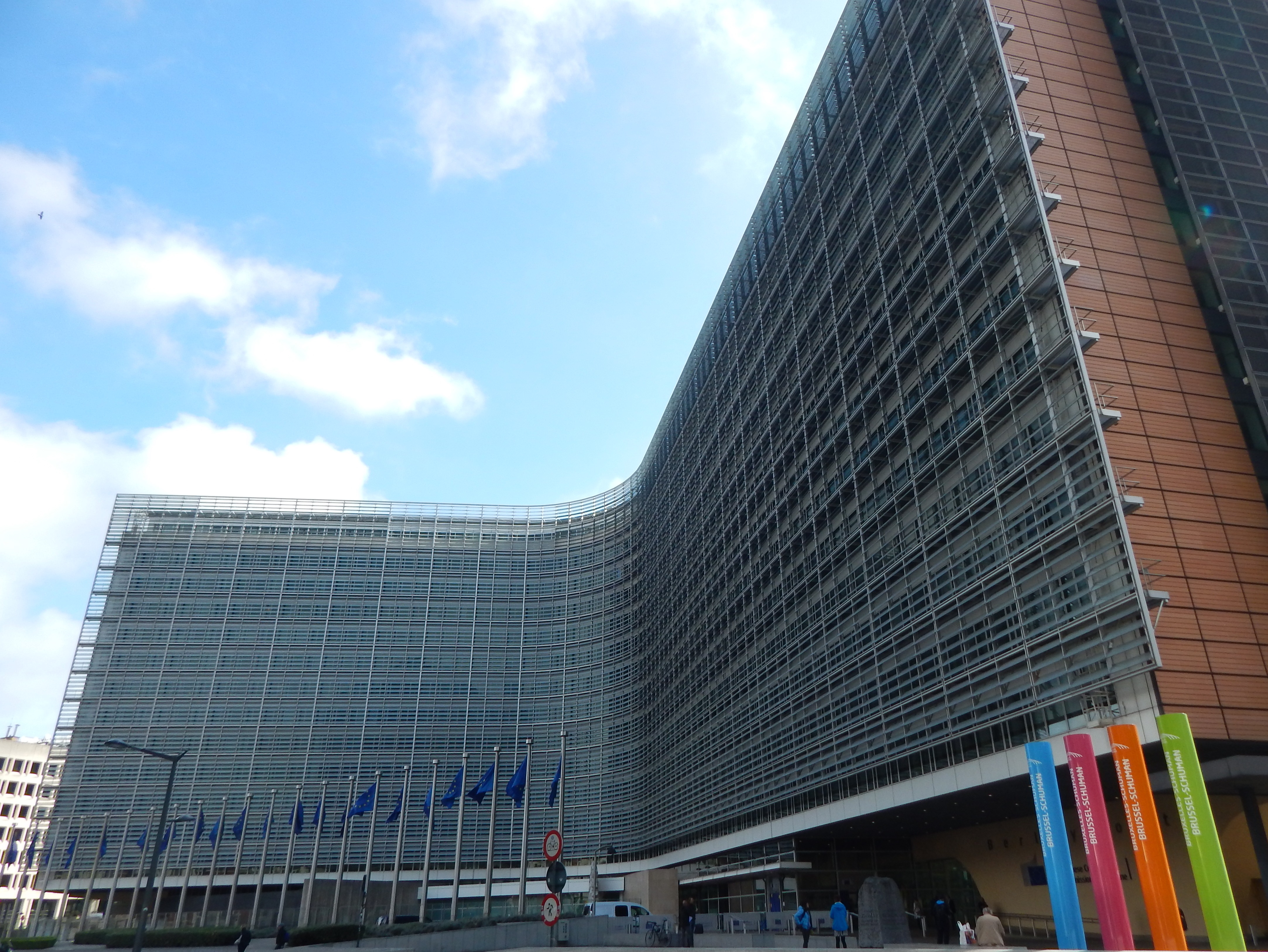 Vue de l'entrée principale (est) du bâtiment Berlaymont.